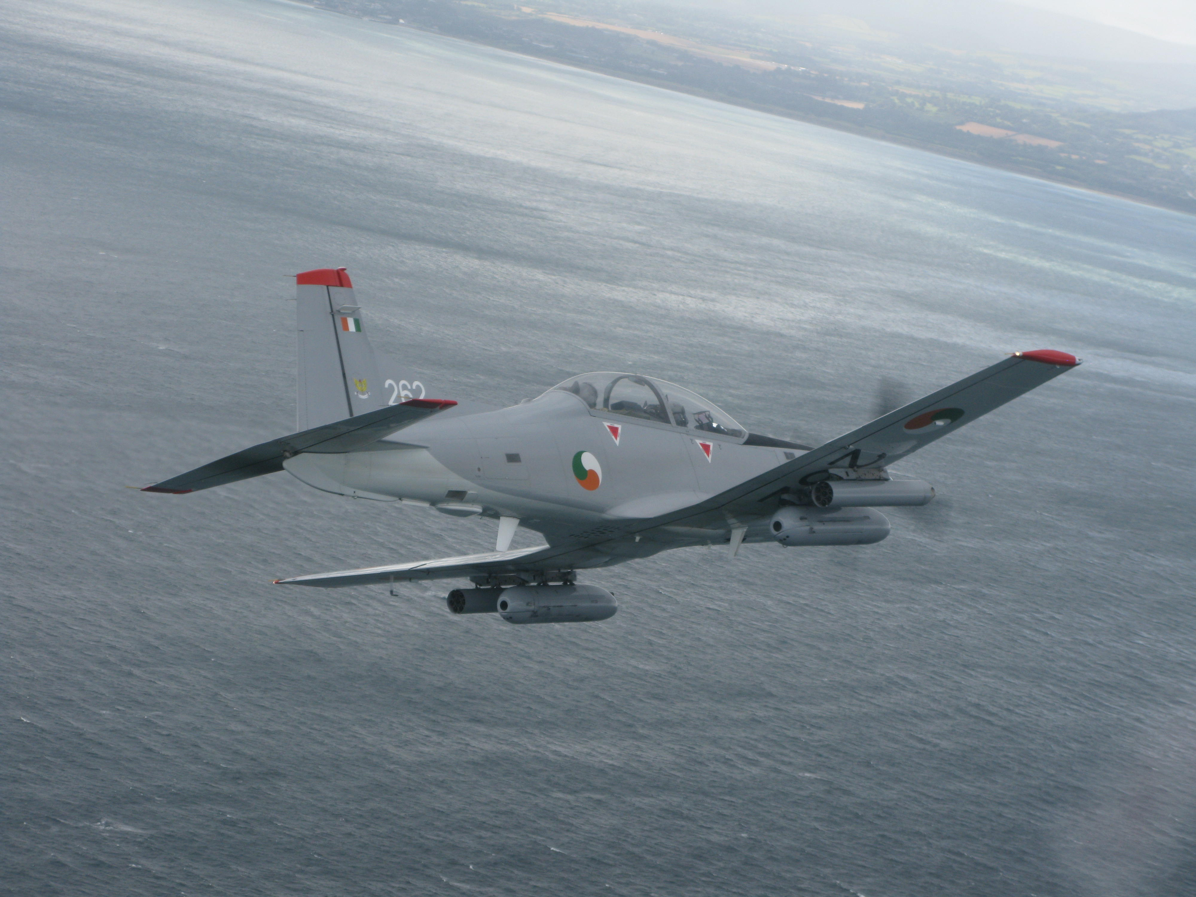 Flight Fest 17